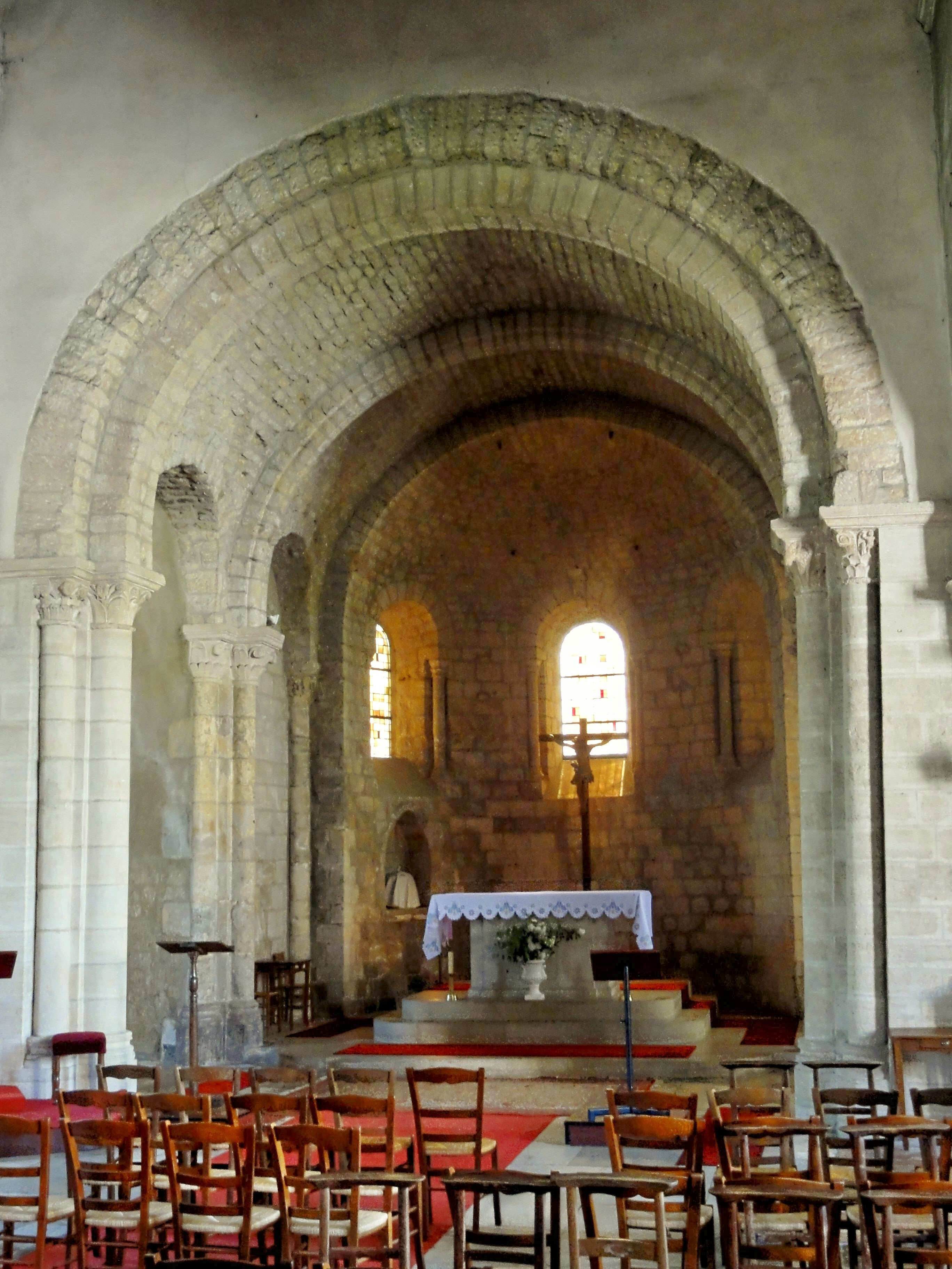 Chœur.